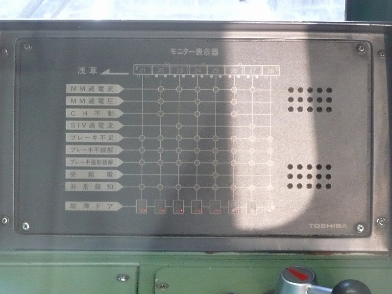 東武20000系のモニタ装置